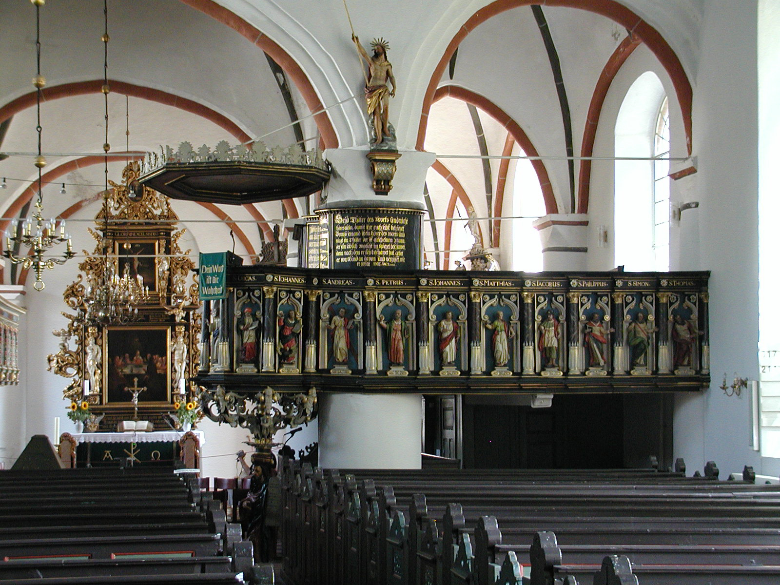 Ein Blick in den vorderten Teil der Kirche